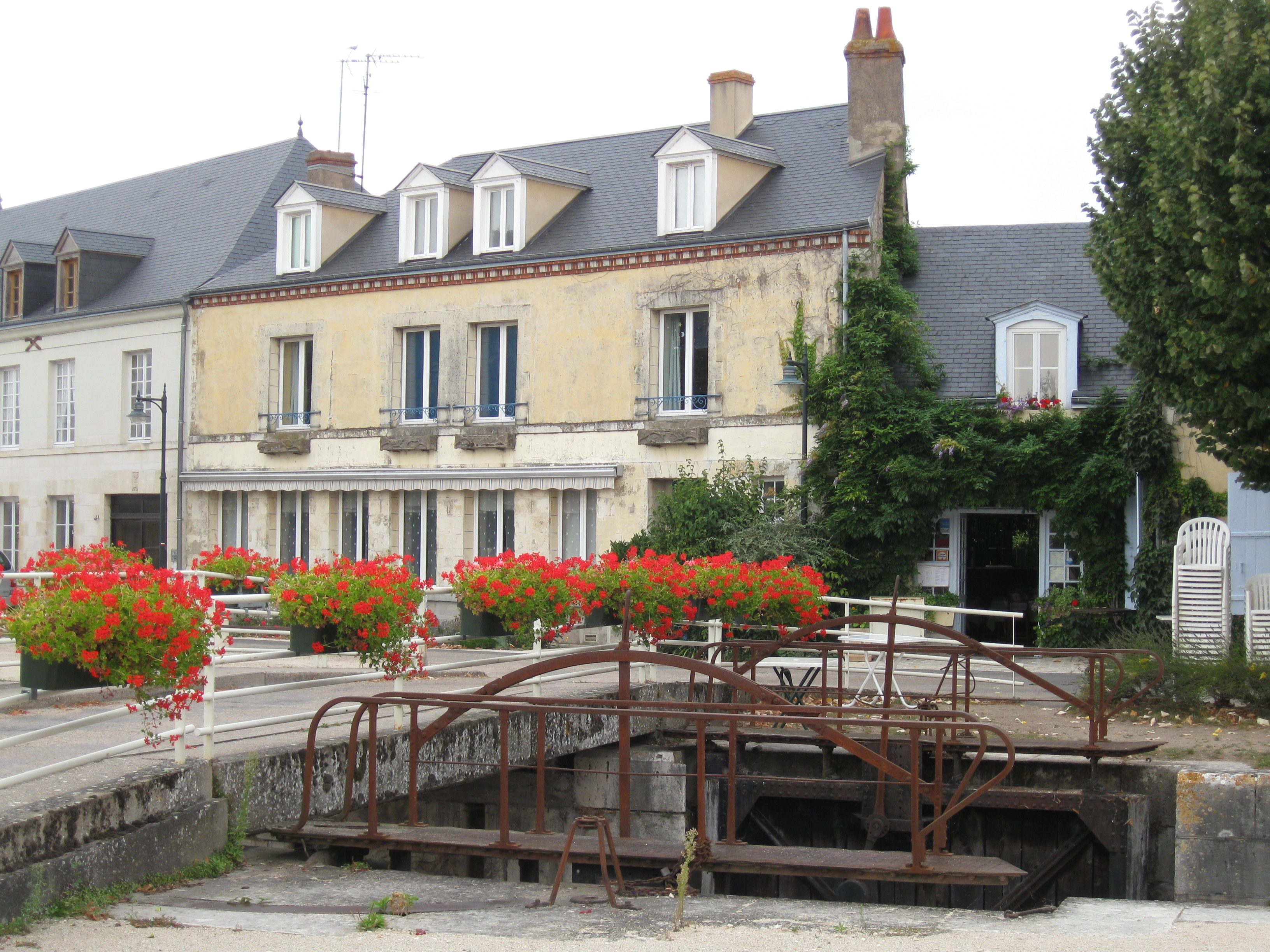 L'écluse de la Patache sur le canal d'Orléans, Combleux, Loiret, France